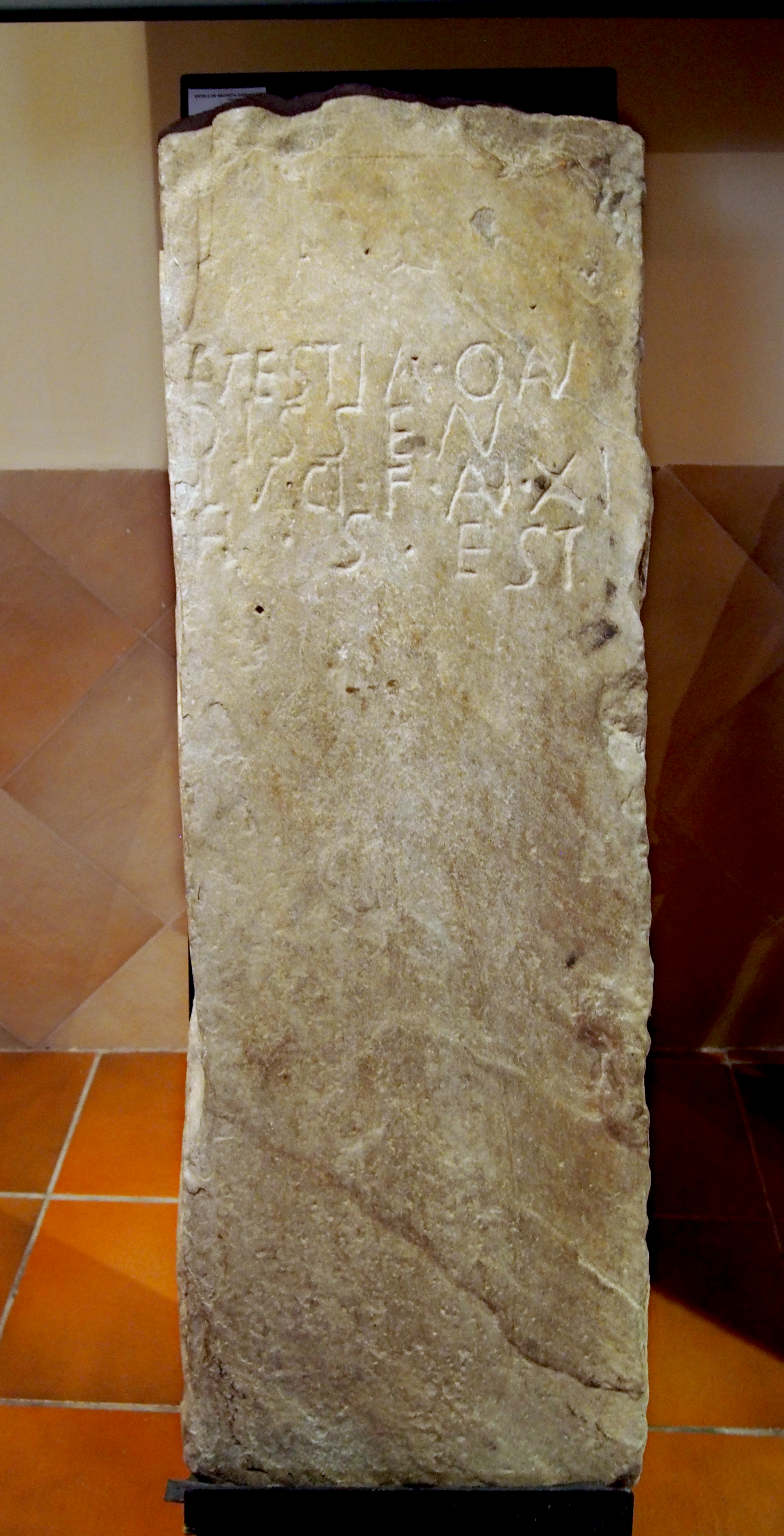 Soriako Lur Garaietan (Tierras Altas) aurkitu zen idazkuna estela batean zizelkatua. Hildakoaren izenak, Antestia Oandissen, bi osagai ditu: lehenengoa latinez eta bigarrena aitzin-euskaraz edo akitanieraz.